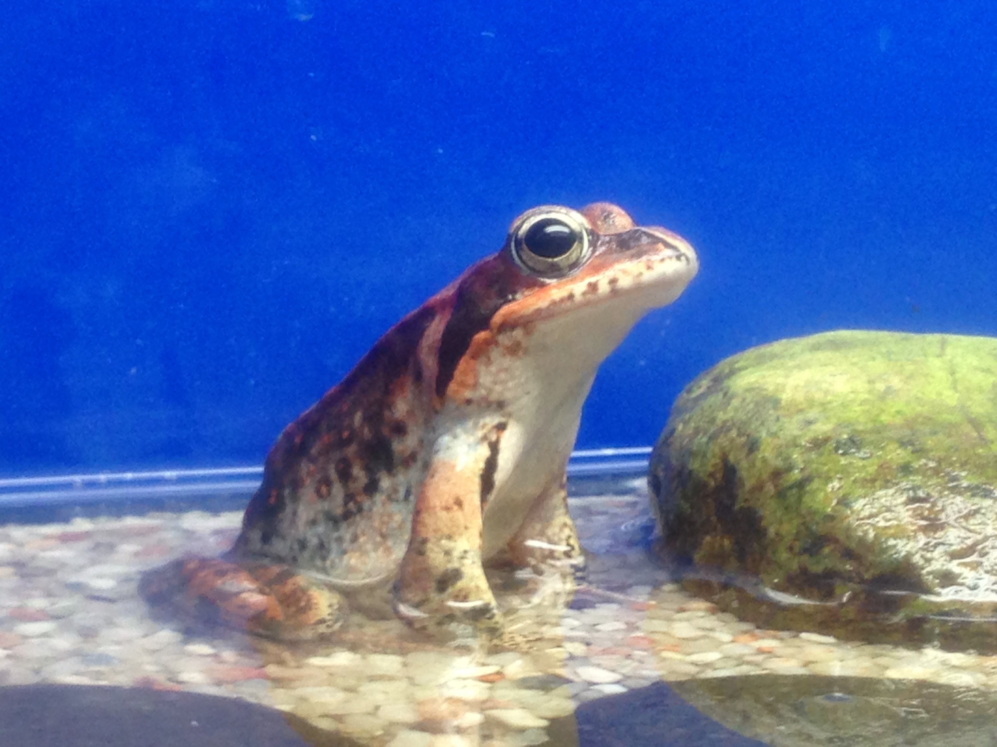 エゾアカガエル。サケのふるさと 千歳水族館飼育個体。